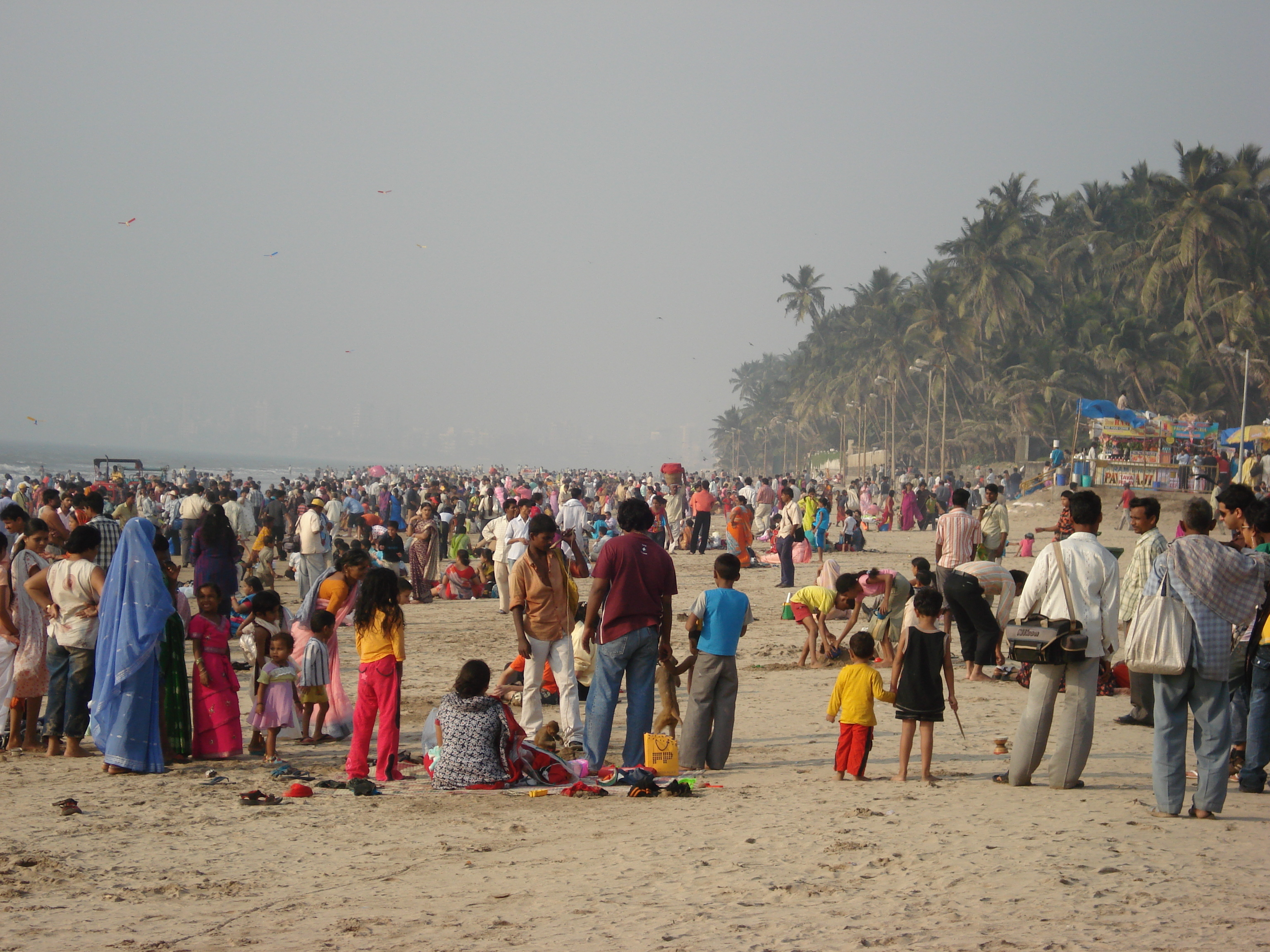 Juhu Chowpati/Juhu beach, Mumbay